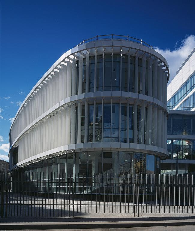 Арбитражный суд Московского округа